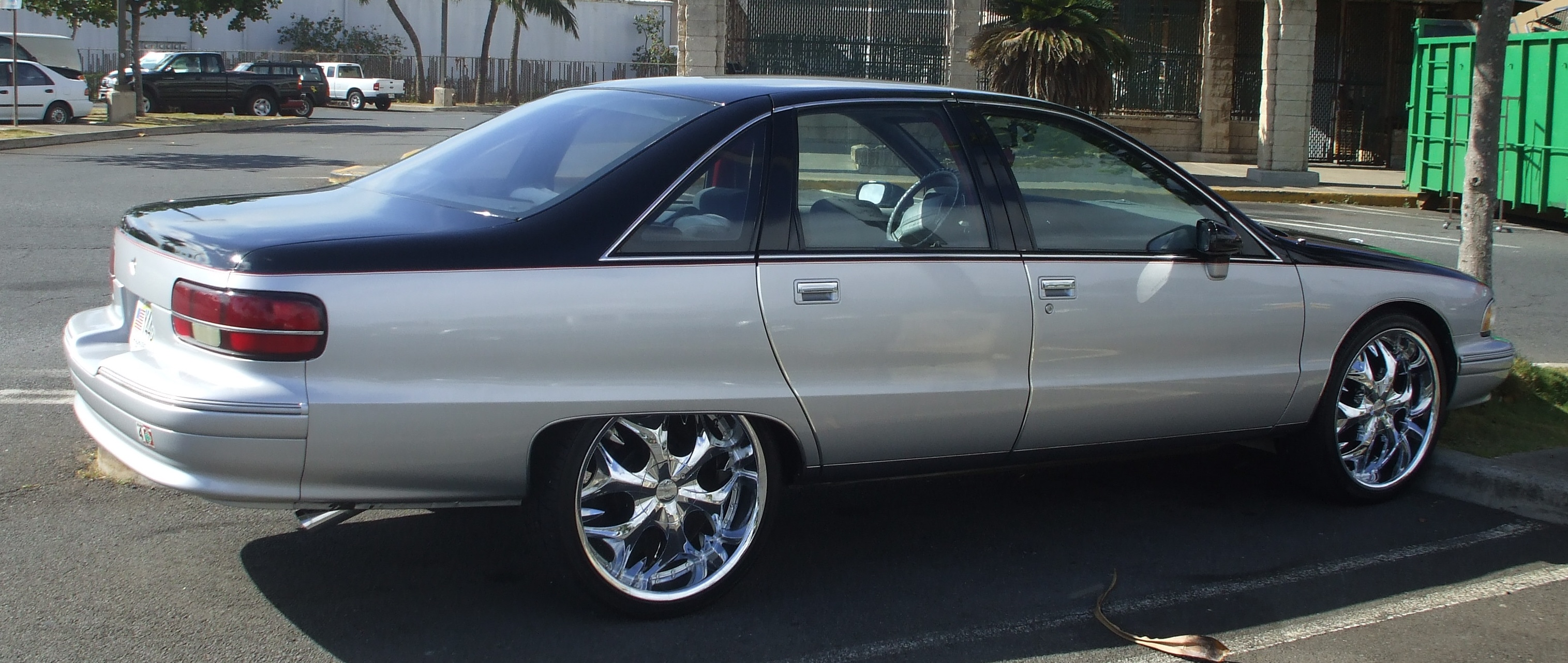 Chevrolet Impala "Bubble."